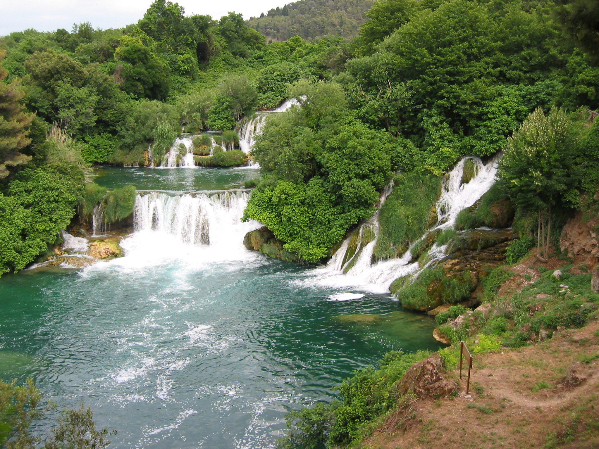 Nationalpark Krka, Skradinski buk, Wasserfälle in Kroatien